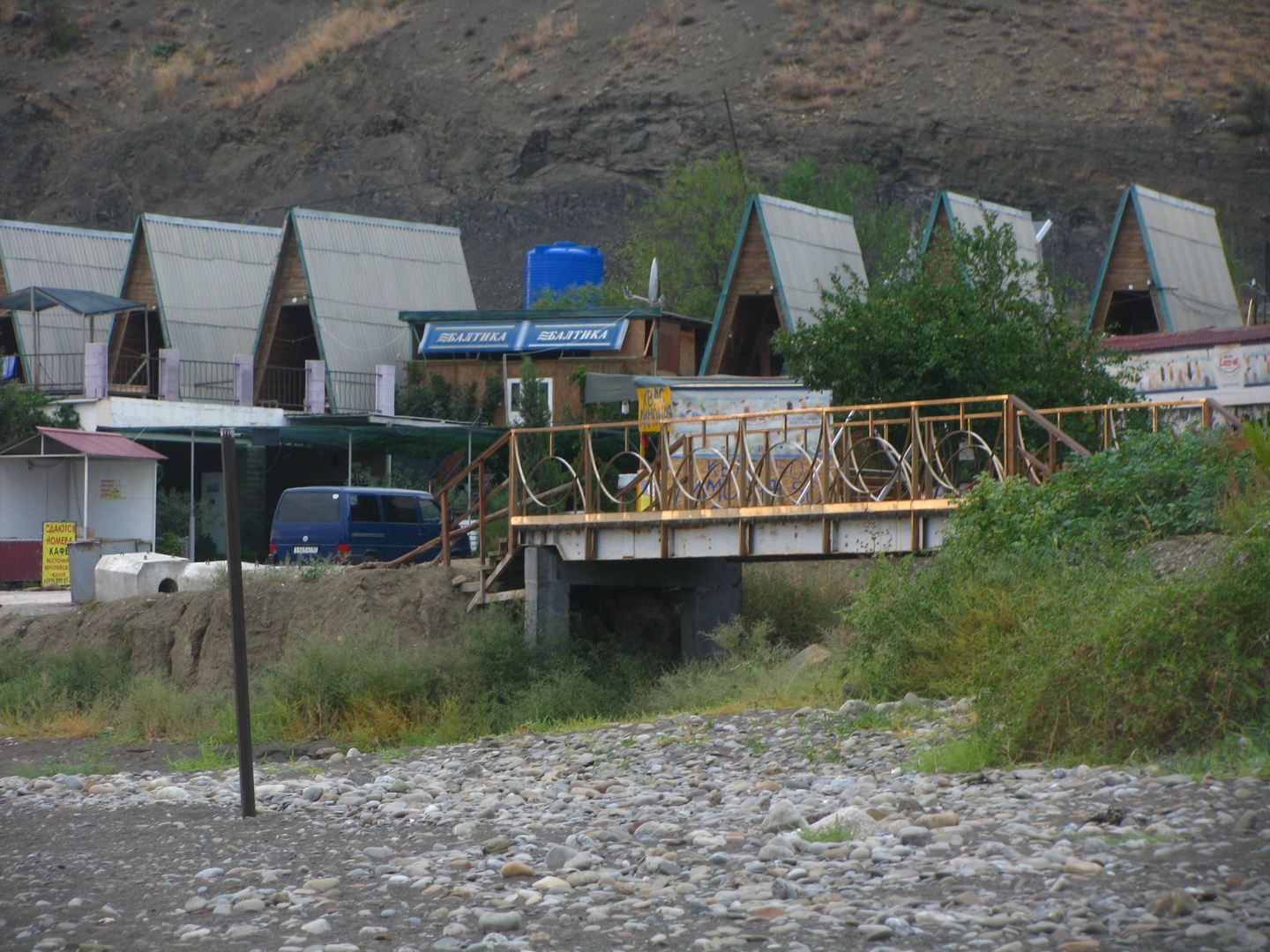 Устье реки Кутлак, Крым.